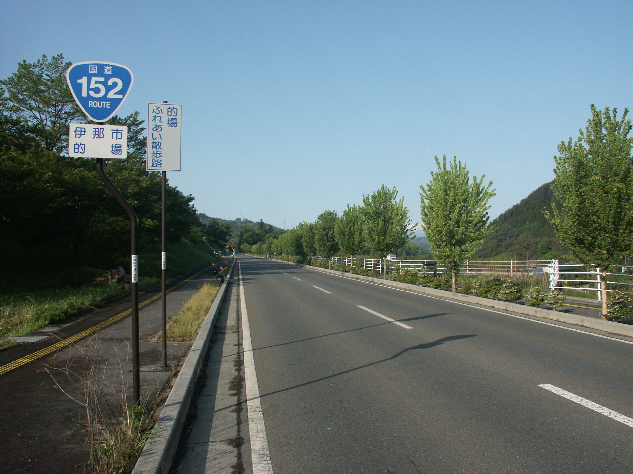 国道152号線高遠バイパス長野県伊那市的場付近